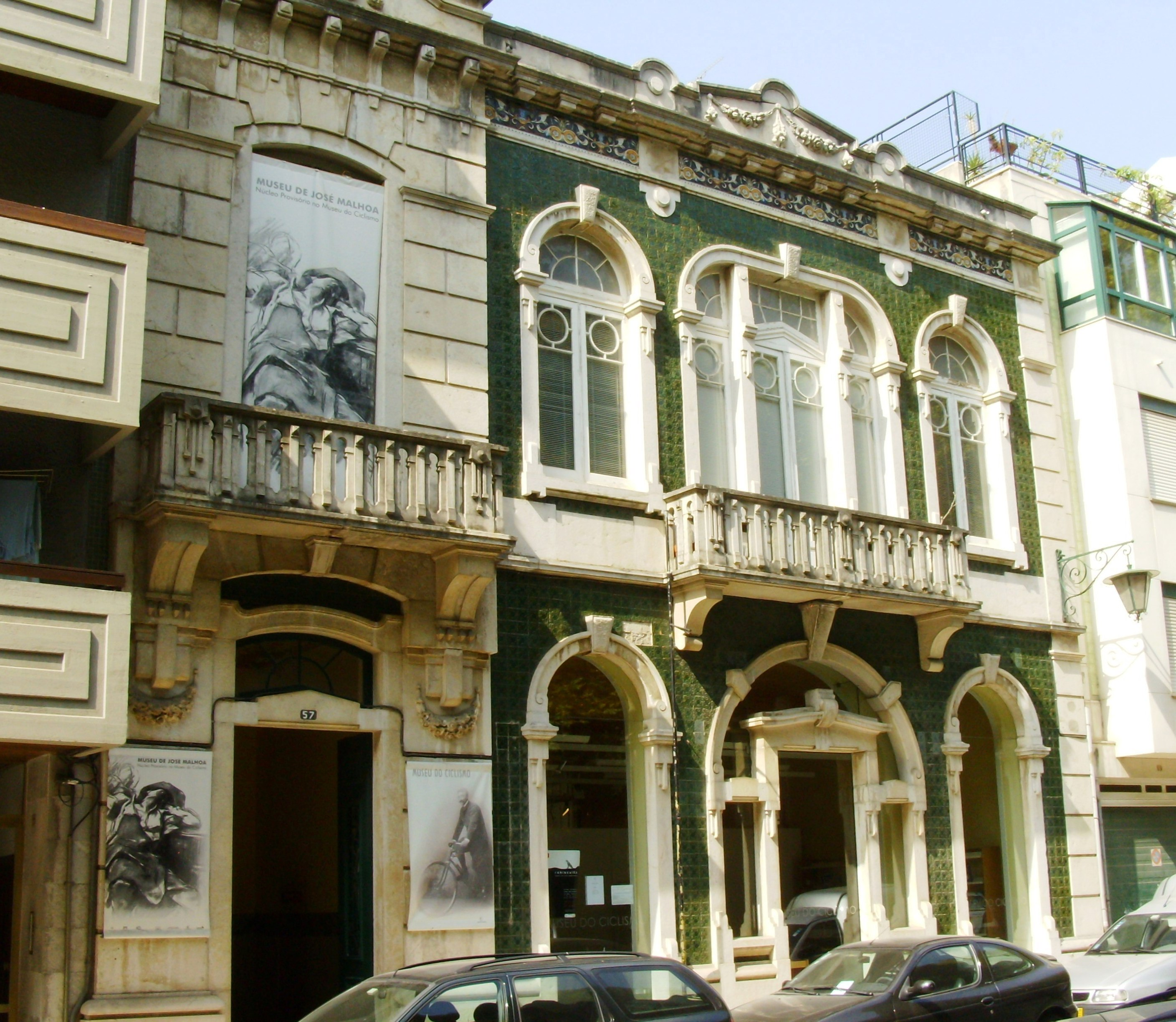 Museu do Ciclismo, Caldas da Rainha, Portugal: fachada.